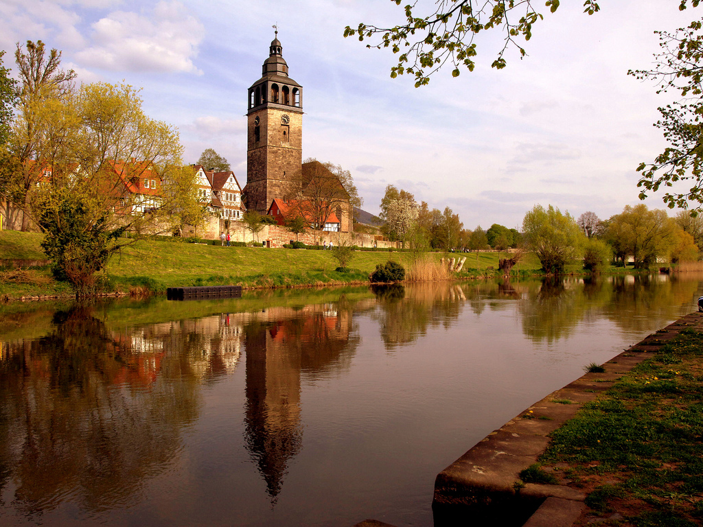 St. Crucius-Kirche im Stadtteil Allendorf.